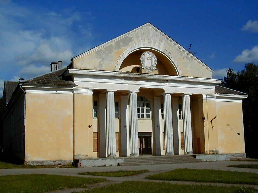 Culture-club in Seda, Latvia